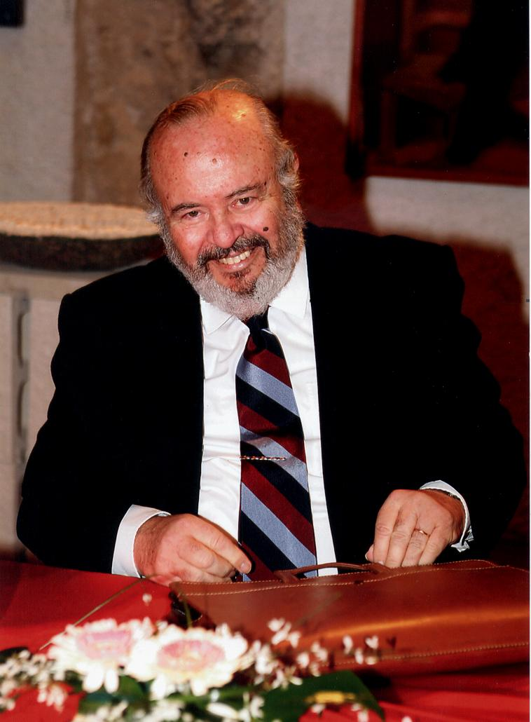 Membre del Consell Valencîà de Cultura